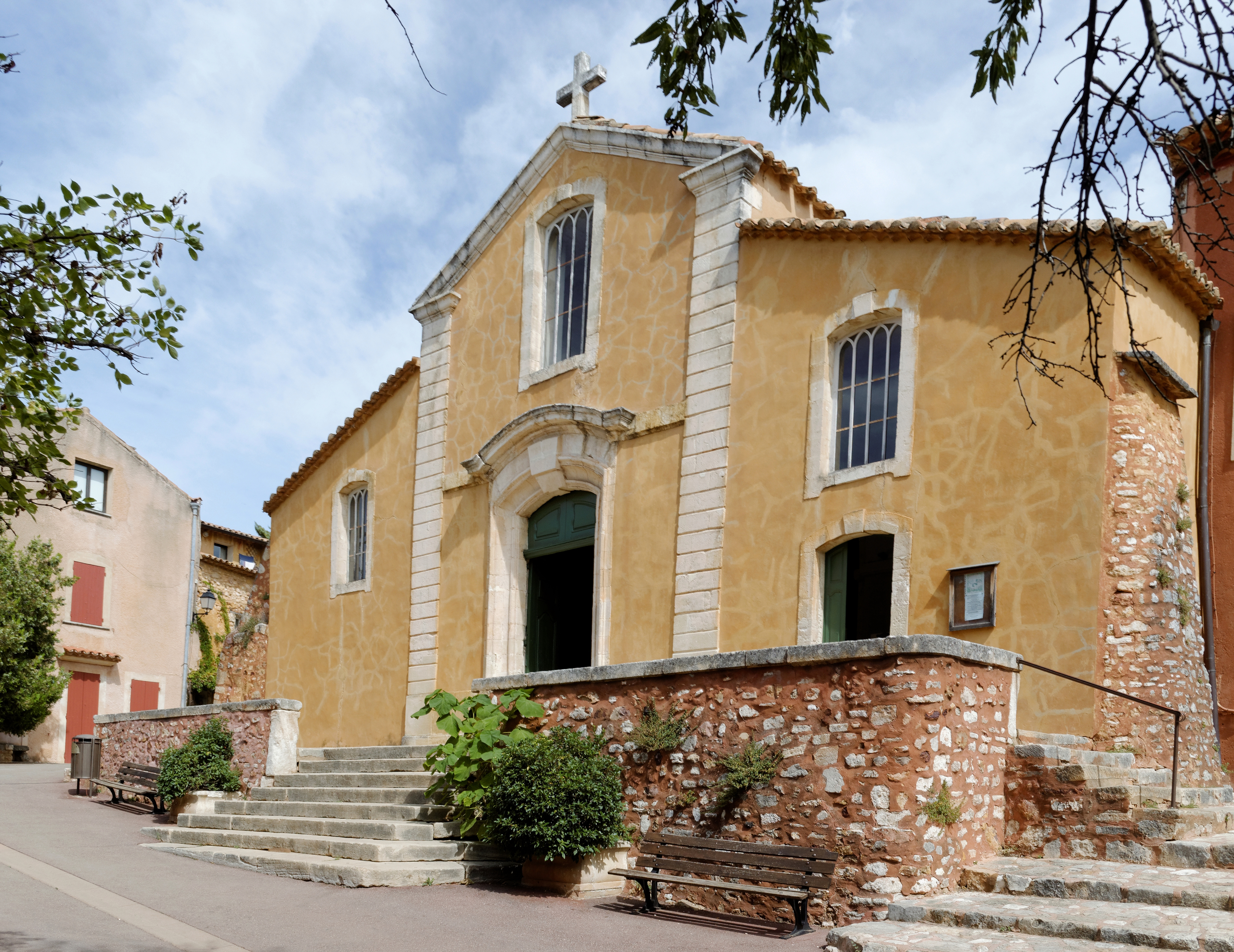 Église de Roussillon (Vaucluse)